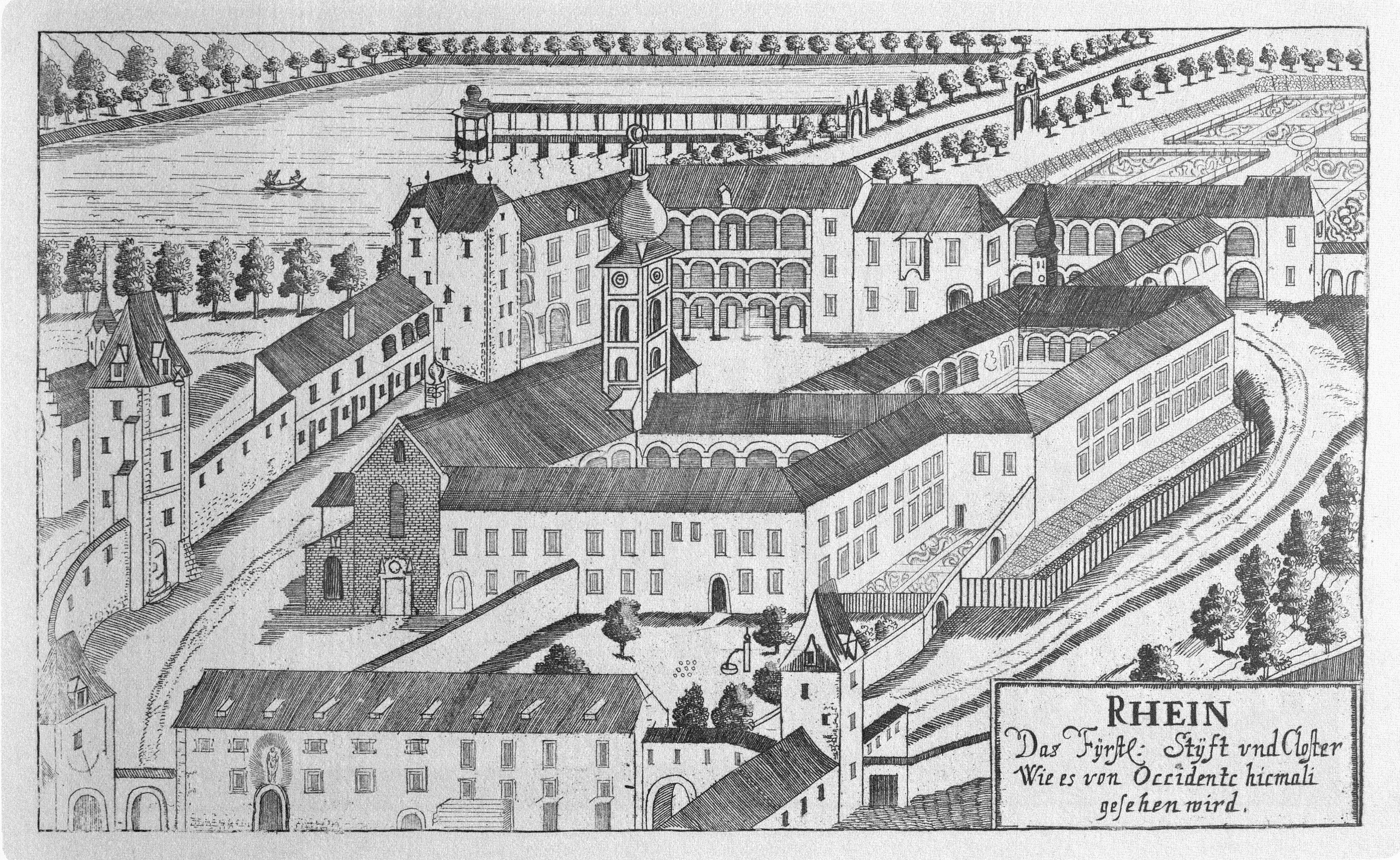 Stich des Stiftes Rein aus dem Jahr 1681. Blick aus Richtung Westen G. M. Vischers Käyserlichen Geographi, Topographia Ducatus Stiriae, Das ist: Eigentliche Delineation / und Abbildung aller Städte / Schlösser / Marcktfleck / Lustgärten / Probsteyen / Stiffter / Clöster und Kirchen / so es sich im Herzogthumb Steyrmarck befinden; Und anjetzo Umb einen billichen Preyß zu finden seynd Bey Johann Bitsch Universitäts Buchhandlern / Auff dem Juden=Platz bey der guldenen Saulen. Graz 1681 Die Nummerierung der Dateien folgt der alphabetischen Reihung der Ortsnamen und entspricht nicht dem Vischer-Register